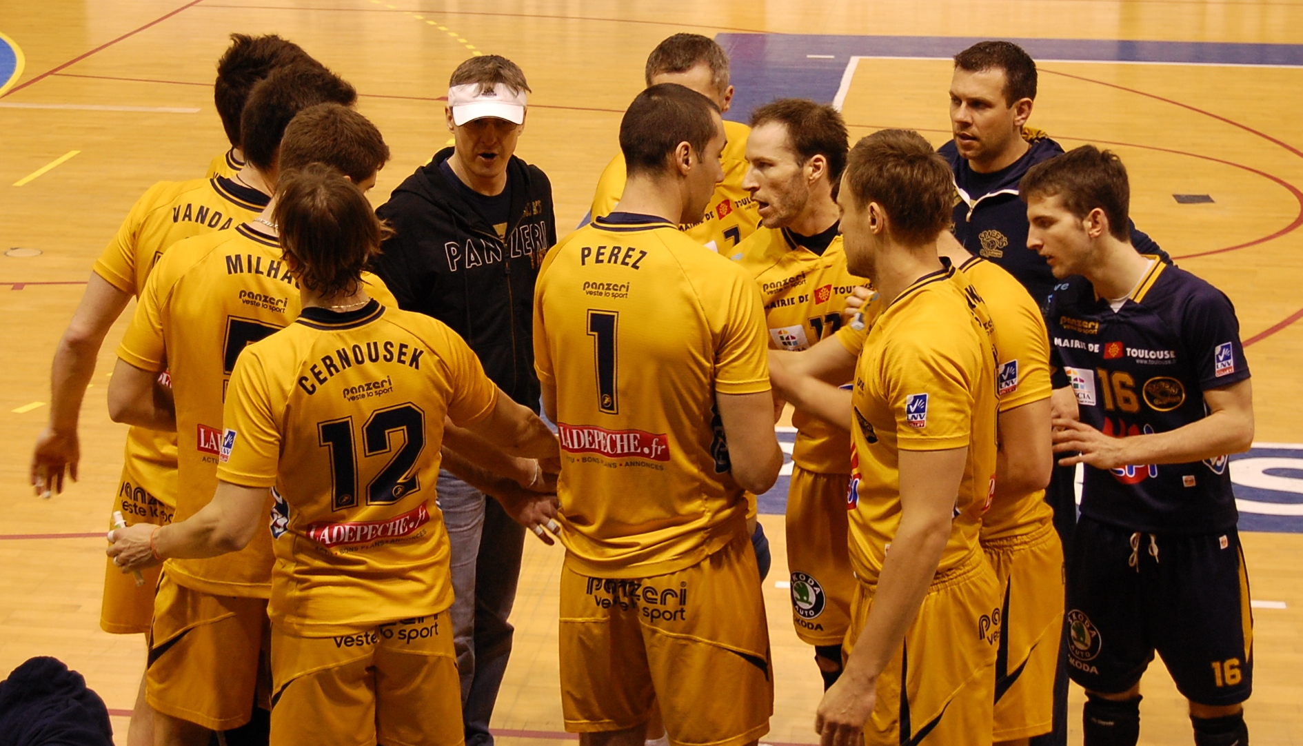 Equipe de volley-ball des Spacer's de Toulouse lors de la saison 2010/2011.